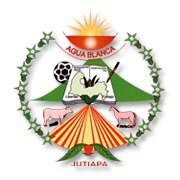 Bandera del Municipio de Agua Blanca, Jutiapa, creado por el Sr. Juan Duarte (QEPD)